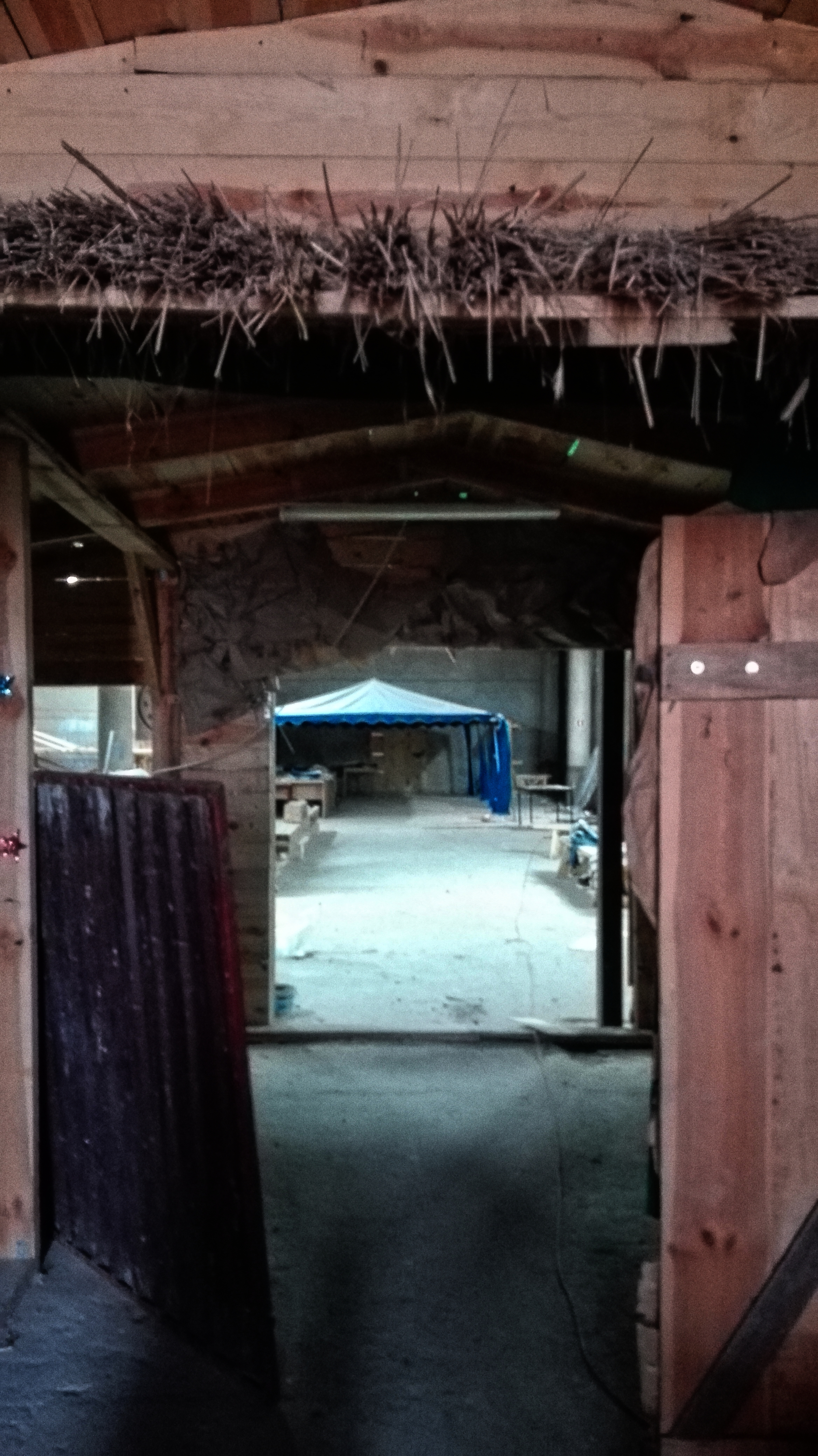 Wielbark, Kościół ewangelicki w trakcie remontu w 2016 Wikidata has entry Q32050712 with data related to this item.